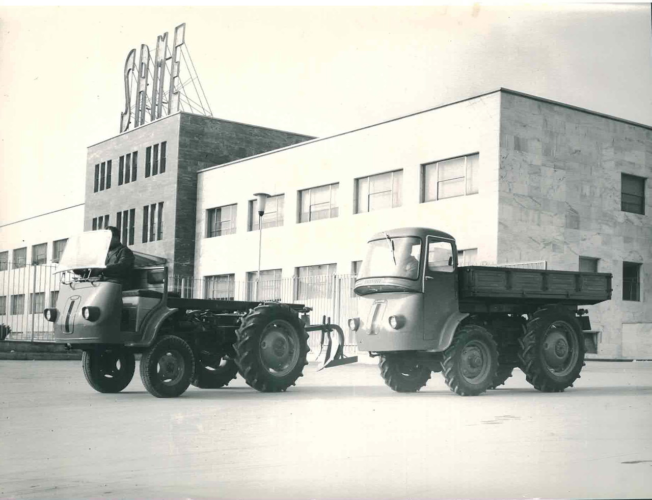 Prototipi Samecar